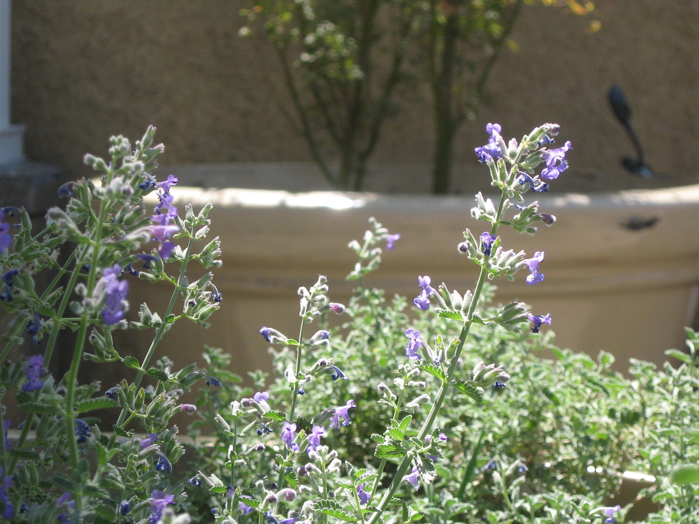 Nepeta cataria, pot plant